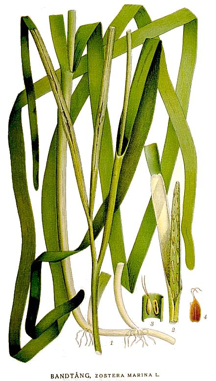 Zostera marina L. Original Description Bandtång, Zostera marina L.